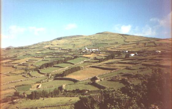 Localidade_do_Toledo,_ilha_de_São_Jorge, Açores, Portugal.